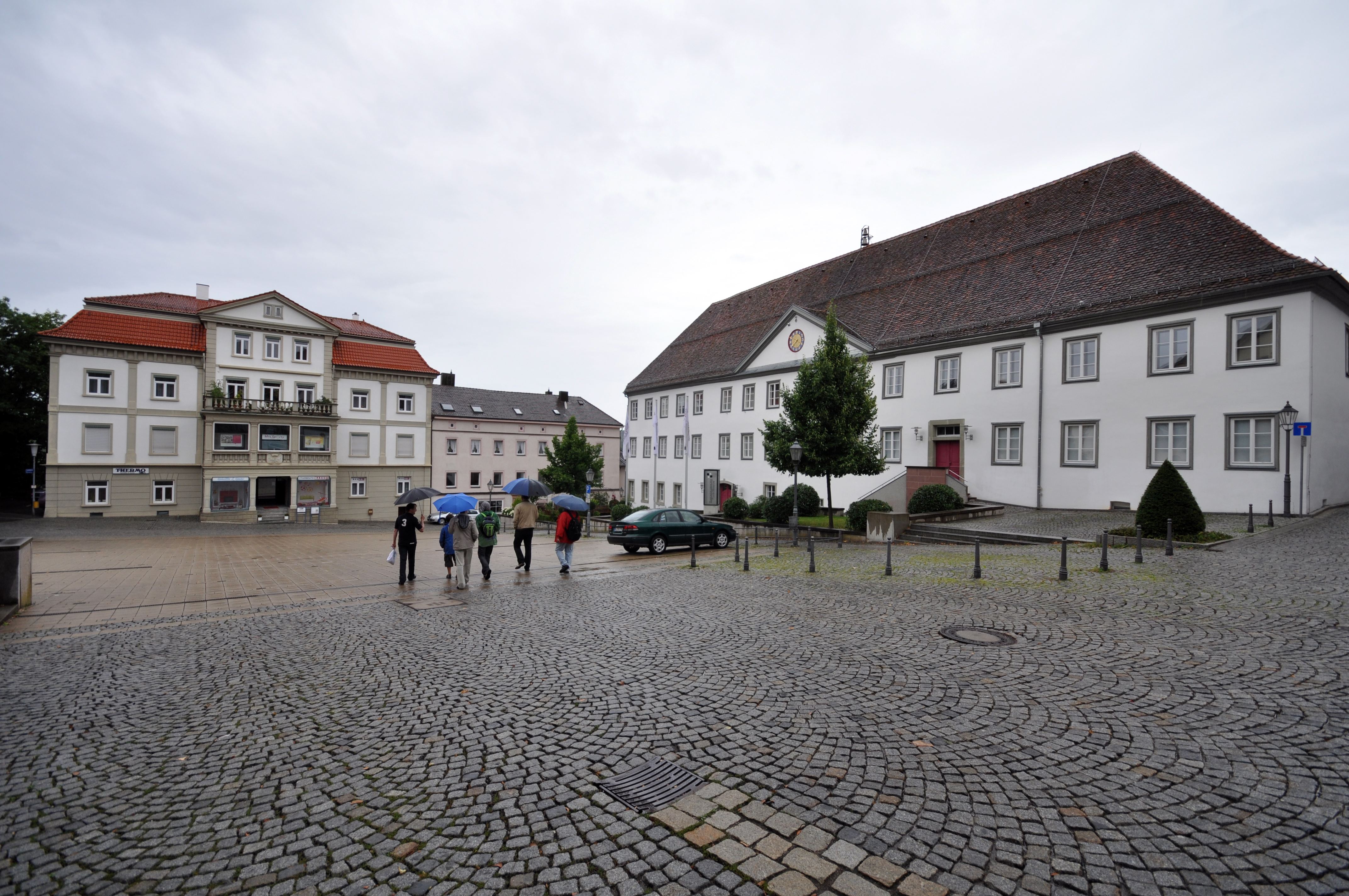 Hechingen